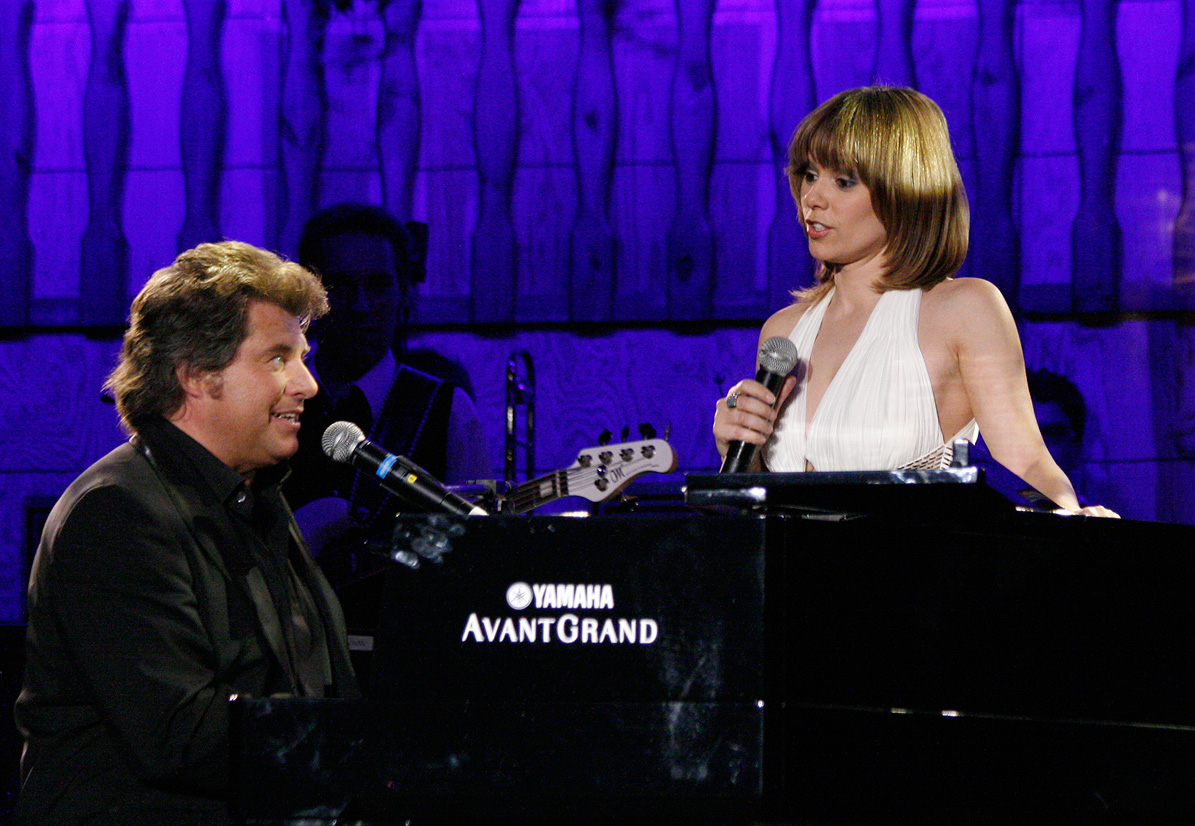 Francine Jordi und Andy Borg mit der Musikantenstadl-Tournee in der Wiener Stadthalle.